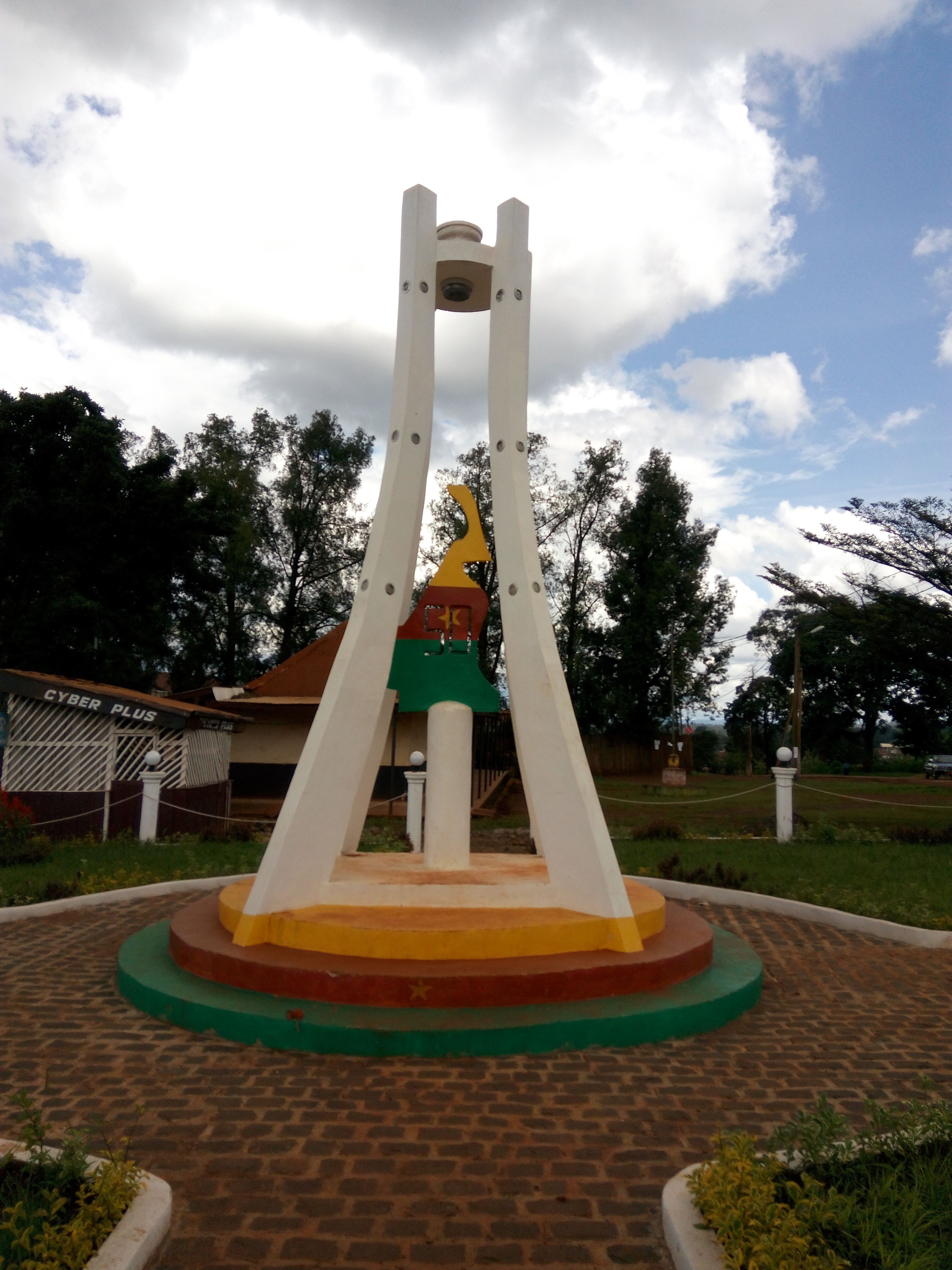 Monument construit à Mbouda pour célébrer le cinquantenaire de la fête de la jeunesse camerounaise en 2016.